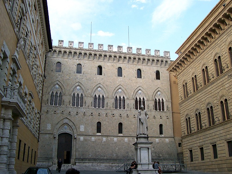 Siena - Palazzo Salimbeni